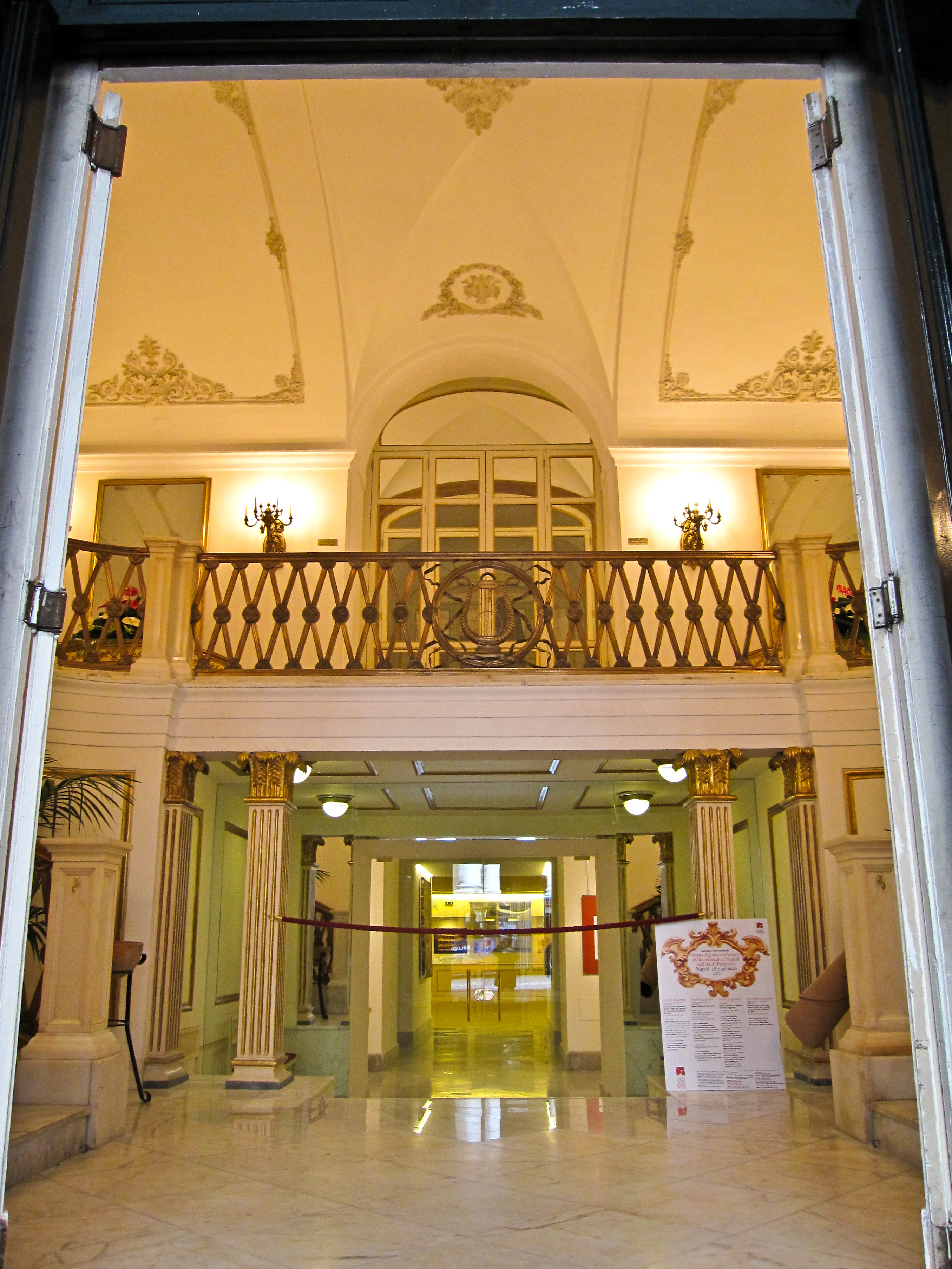 Napoli, Real Teatro San Carlo. Particolare dell'interno.